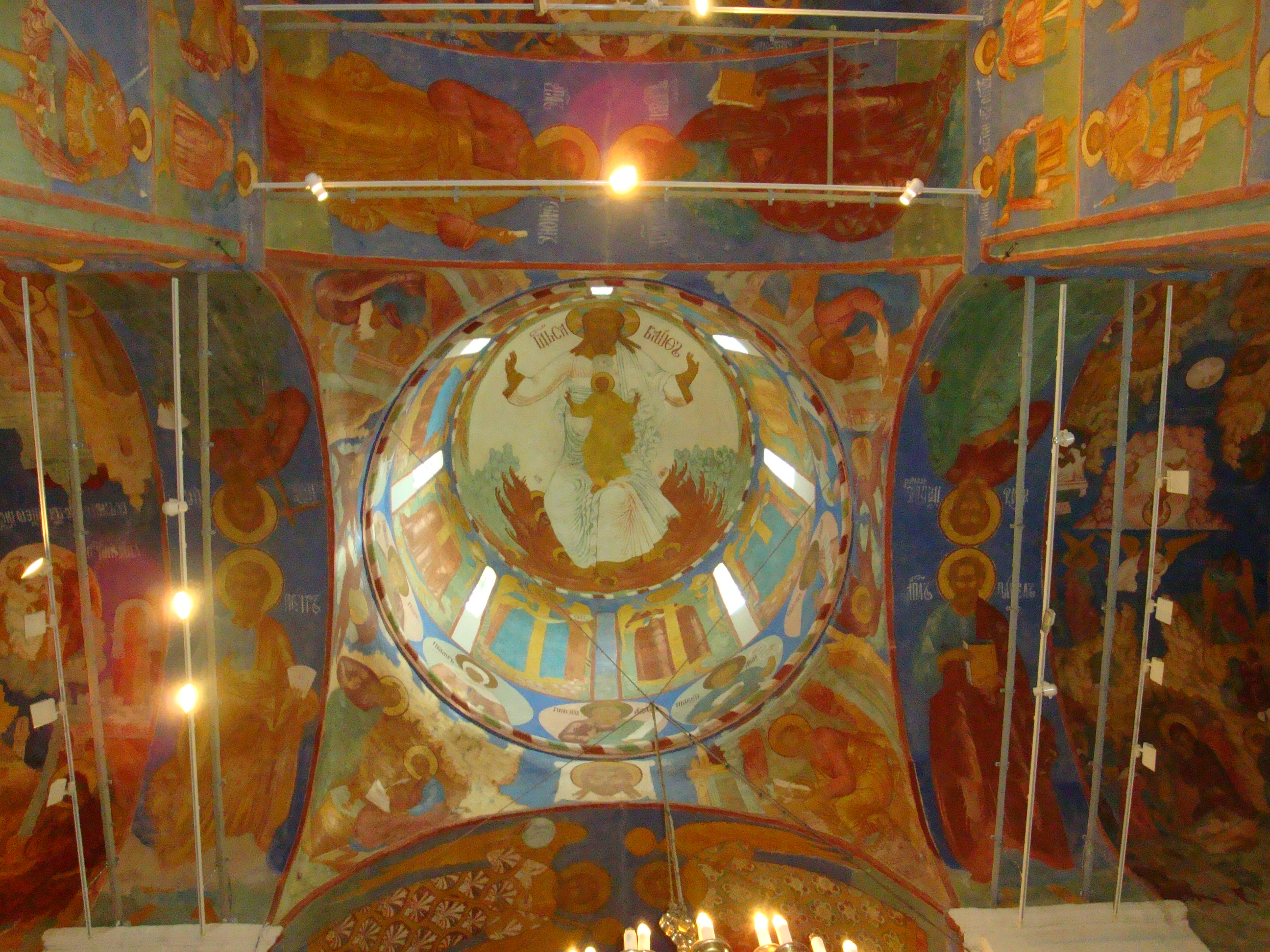 Собор Спасо-Преображенский (Владимирская область, Суздаль, Ленина улица)